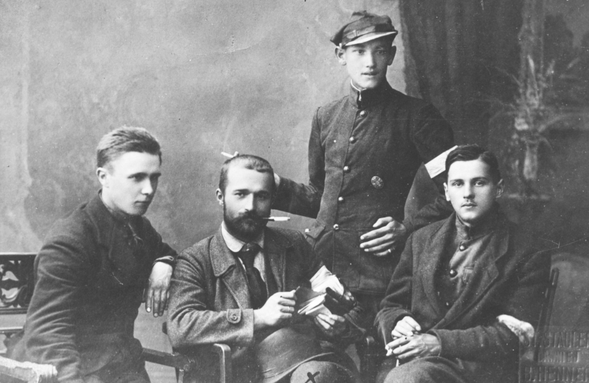 Jerzy Lgocki (z papierosem) wśród powstańców.